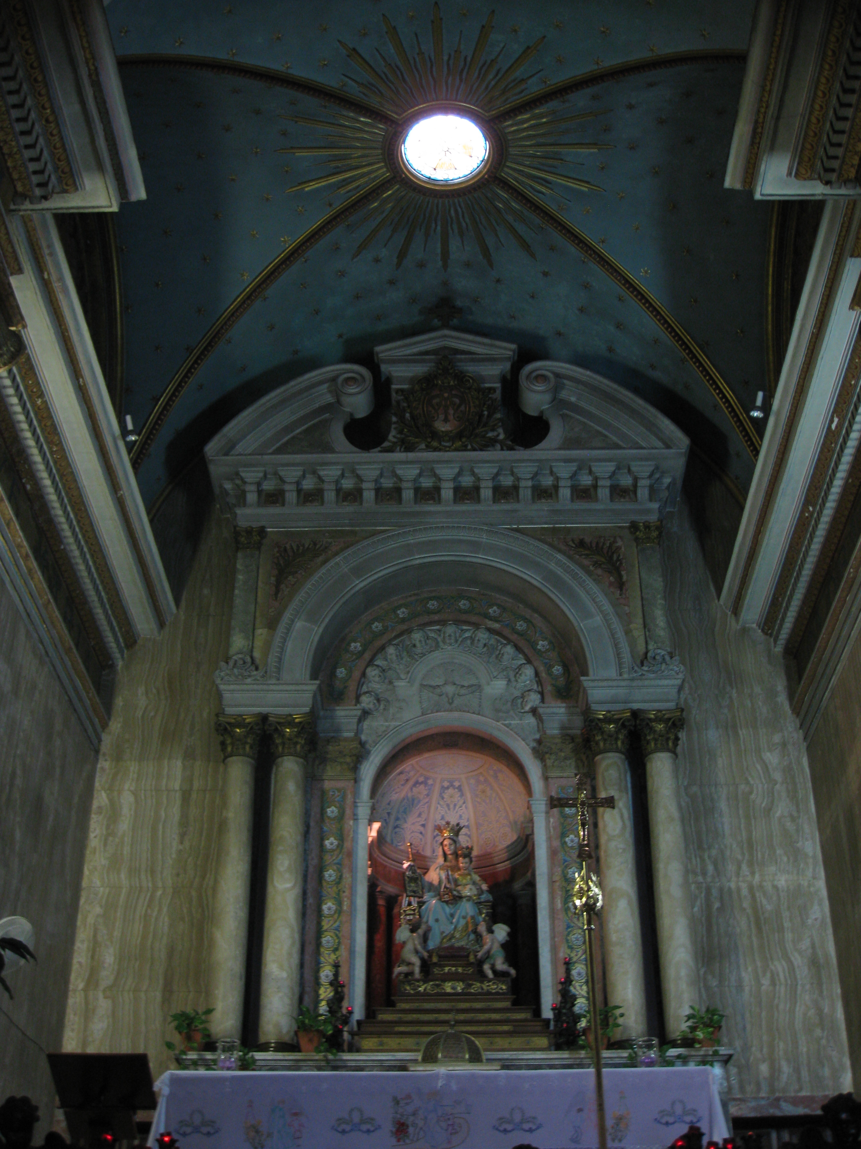 Stella Maris Monastery Interiors פנים מנזר סטלה מאריס